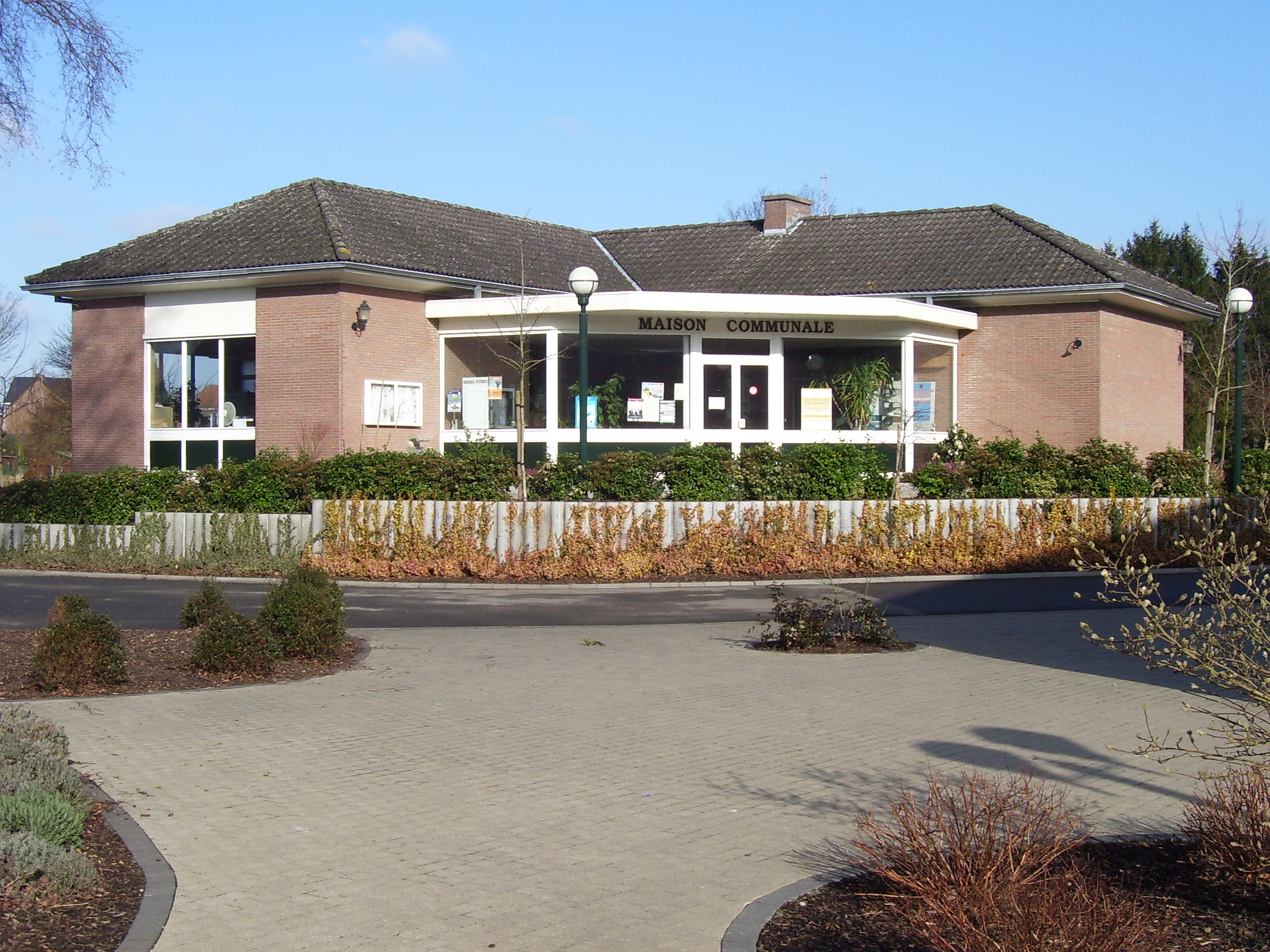 Maison Communale (municipality) of Hélécine, Belgium